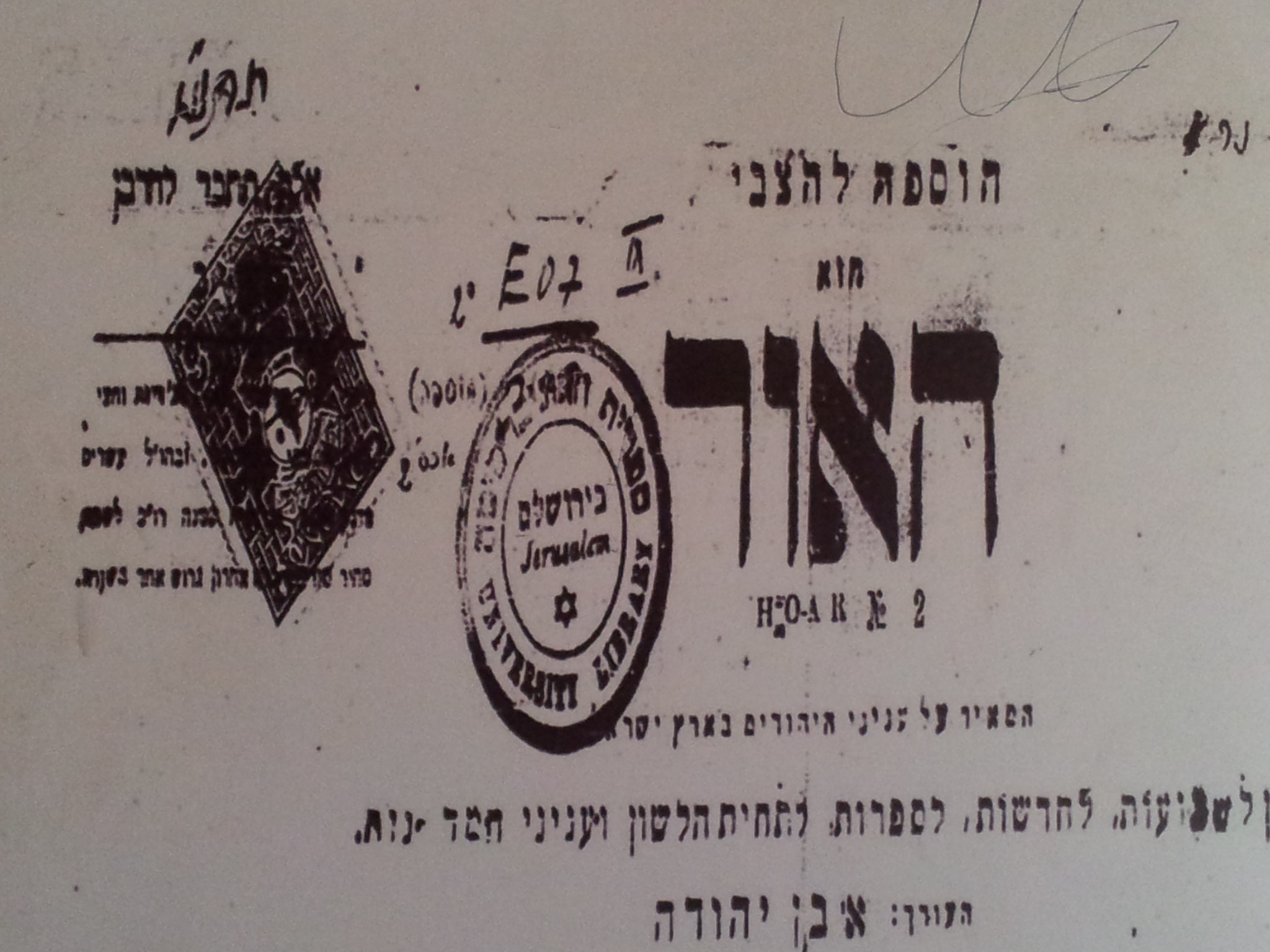 כותרת עיתון "האור" של אליעזר בן-יהודה בסביבות 1893-1892